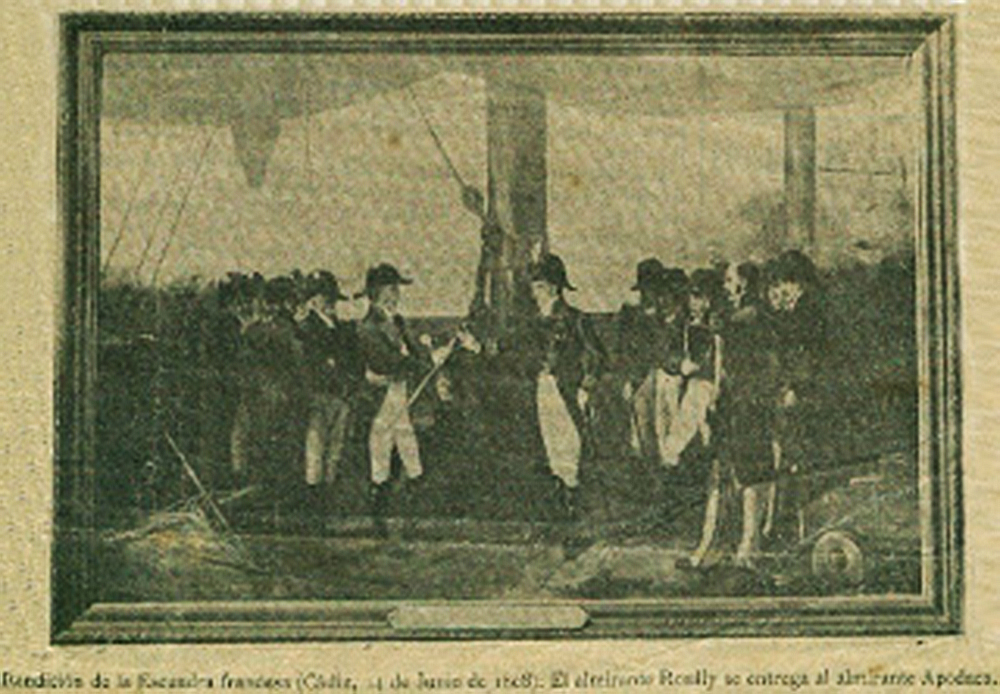 Reporde de prensa por el centenario donde se muestra el desaparecido cuadro de la Rendición del Almirante frances Rosily, donde le entrega el sable al General Apodaca, finalizada la batalla de las Pozas de Santa Isabel 1808.